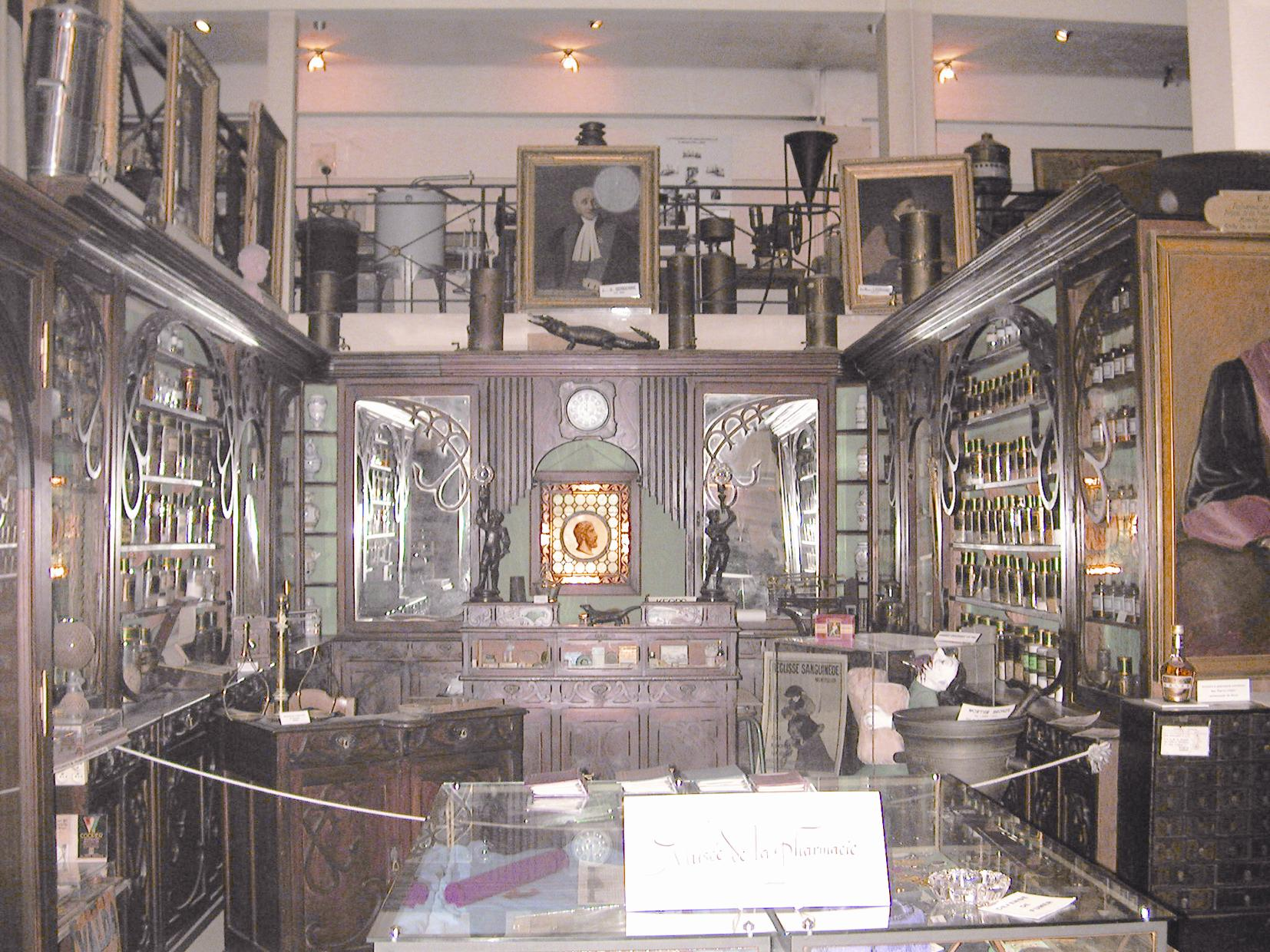 Le musée de la pharmacie de Montpellier (Hérault)